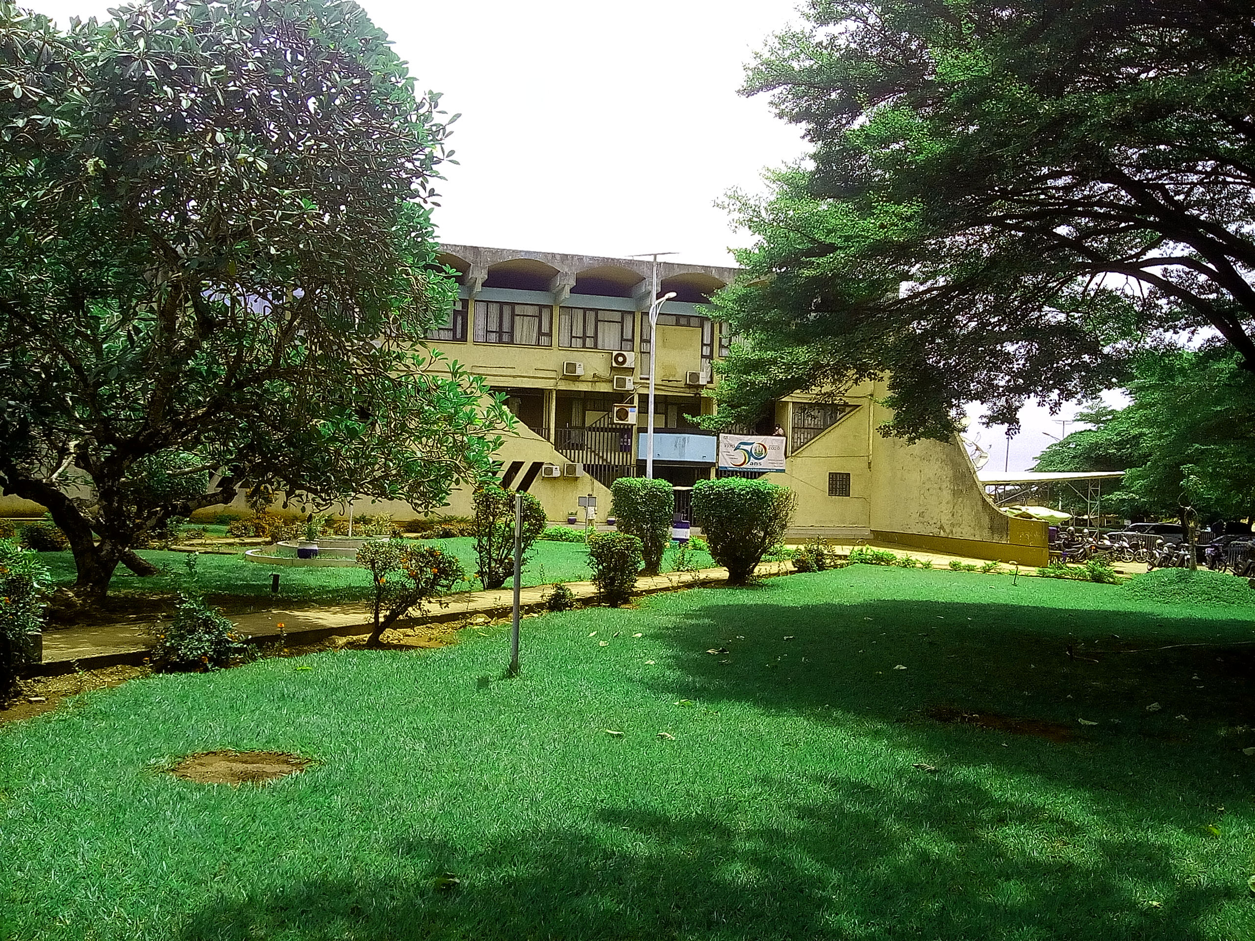 Le rectorat de l'UAC